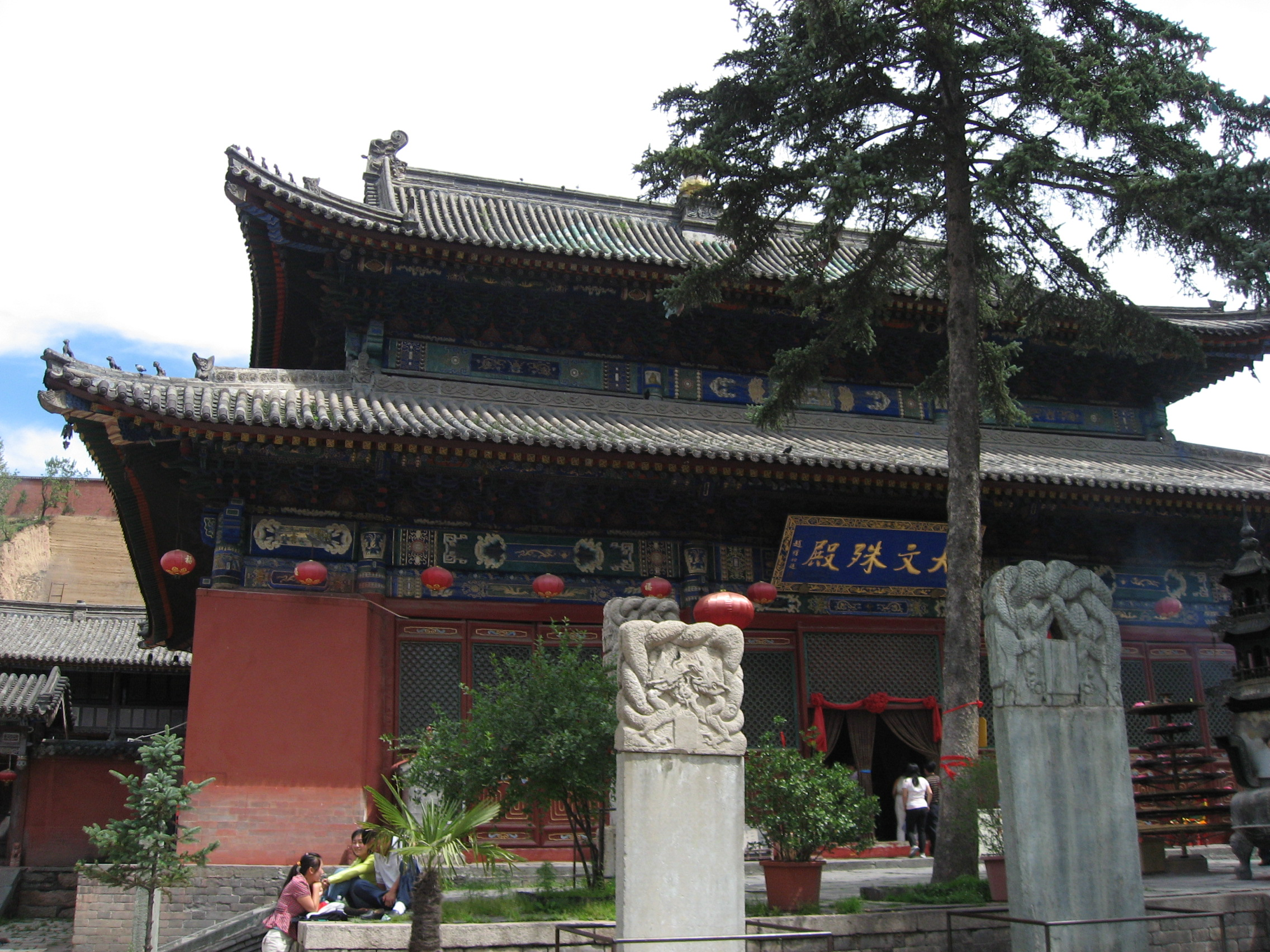 五台山-大文殊殿，殊像寺 由赵朴初题字